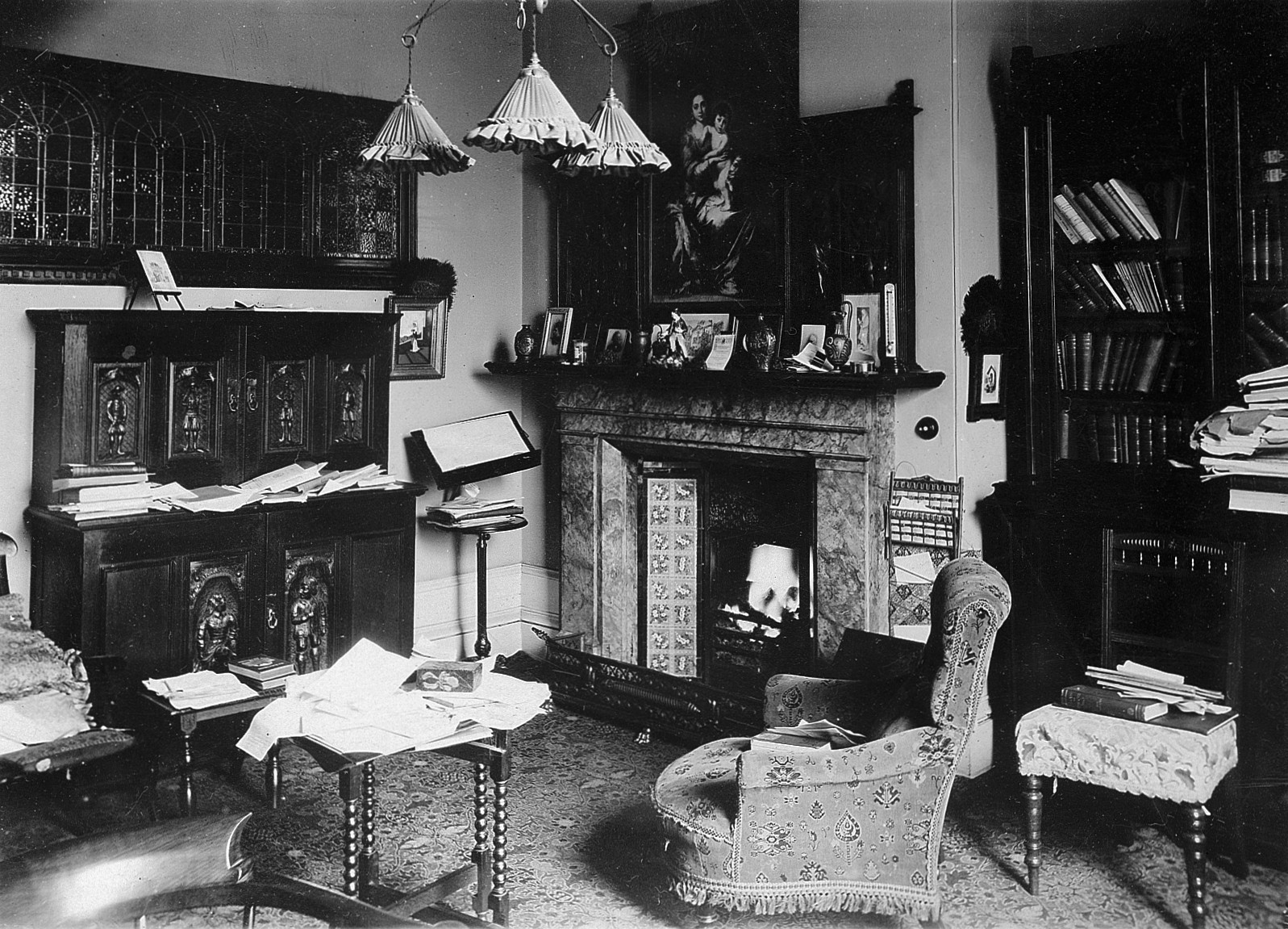 Sir Arthur Schuster's study Wellcome Images Keywords: Arthur Schuster